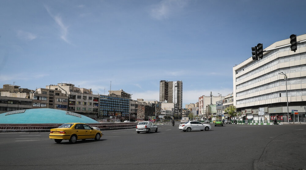 معابر اصلی مرکز شهر تهران در روز ۵ فروردین ۹۹